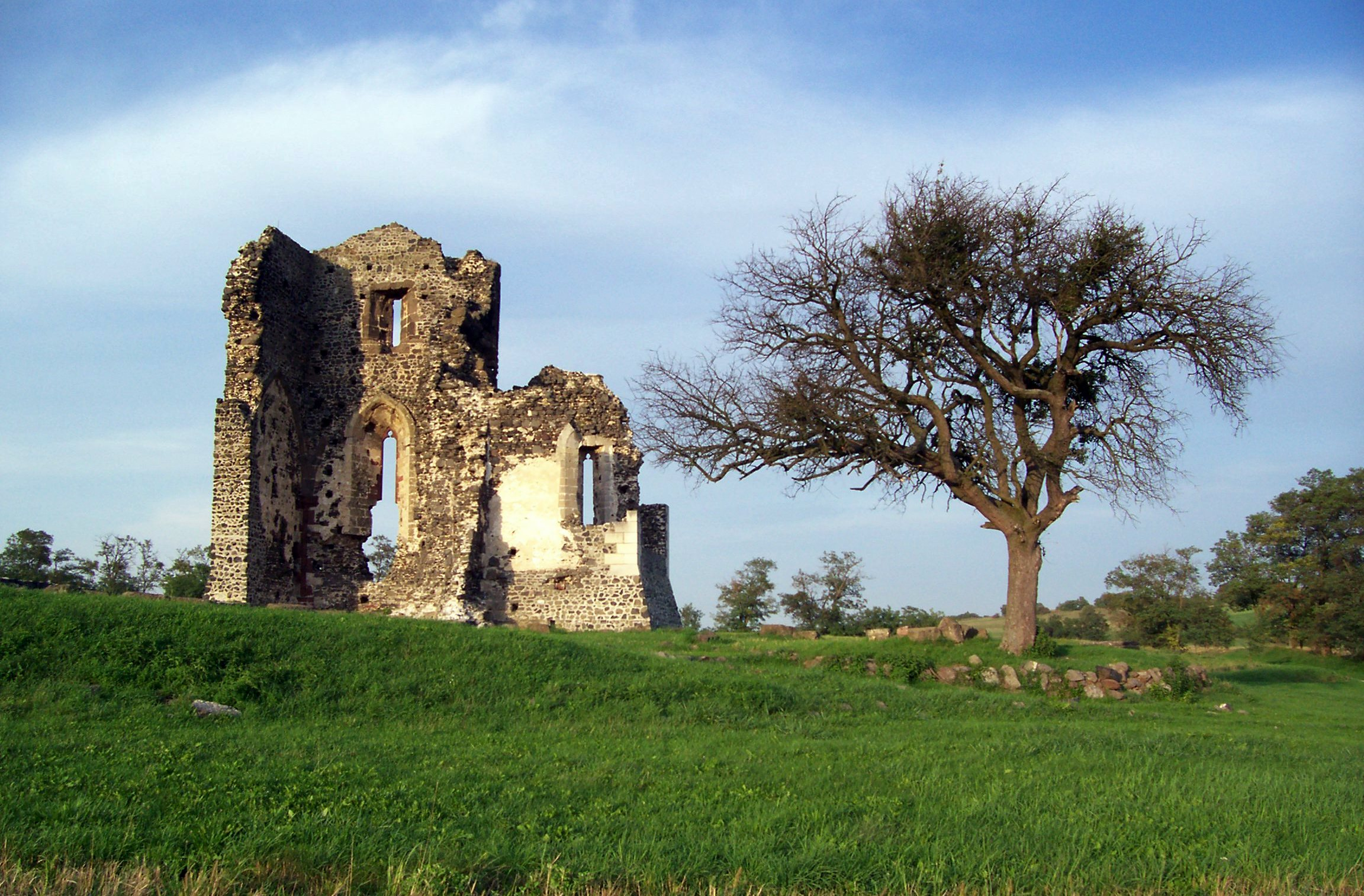 Templomrom, Taliándörögd This is a photo of a monument in Hungary. Identifier: 10448